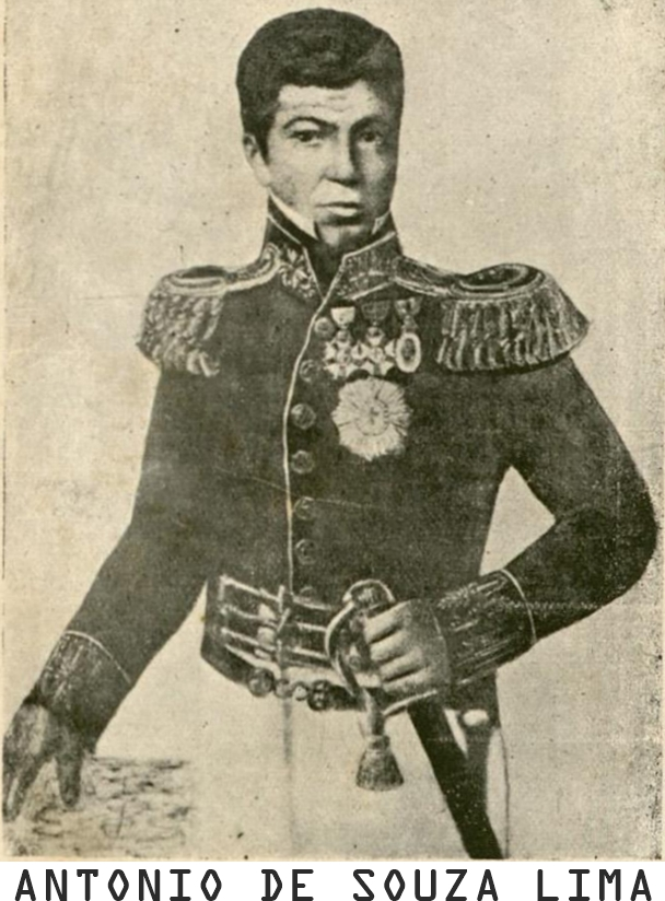 Retrato de Antonio de Souza Lima, do Livro de Bernardino Ferreira Nóbrega, nas Notas de Pirajá da Silva em 1923. Obra de domínio publico.